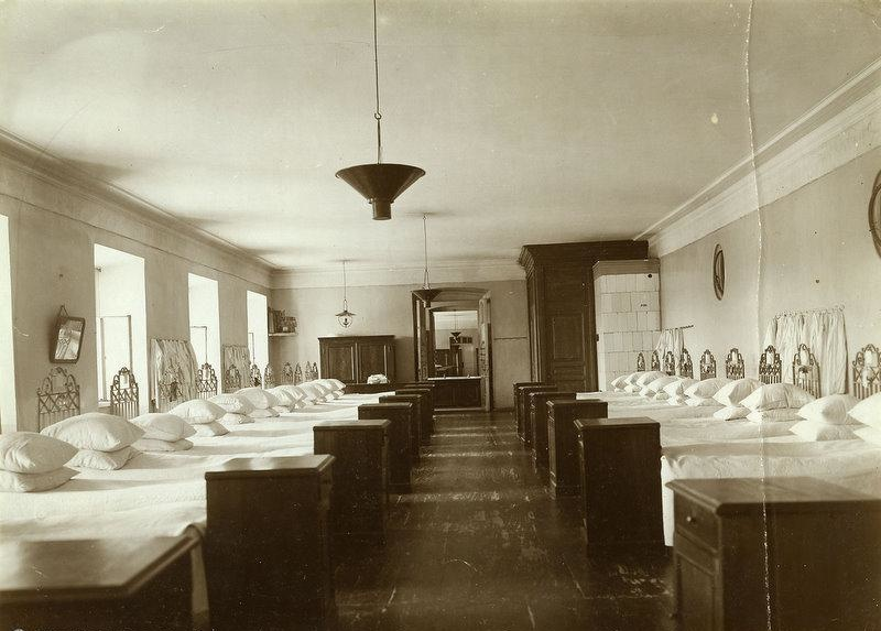 Спальня. Воспитательный дом в Москве.